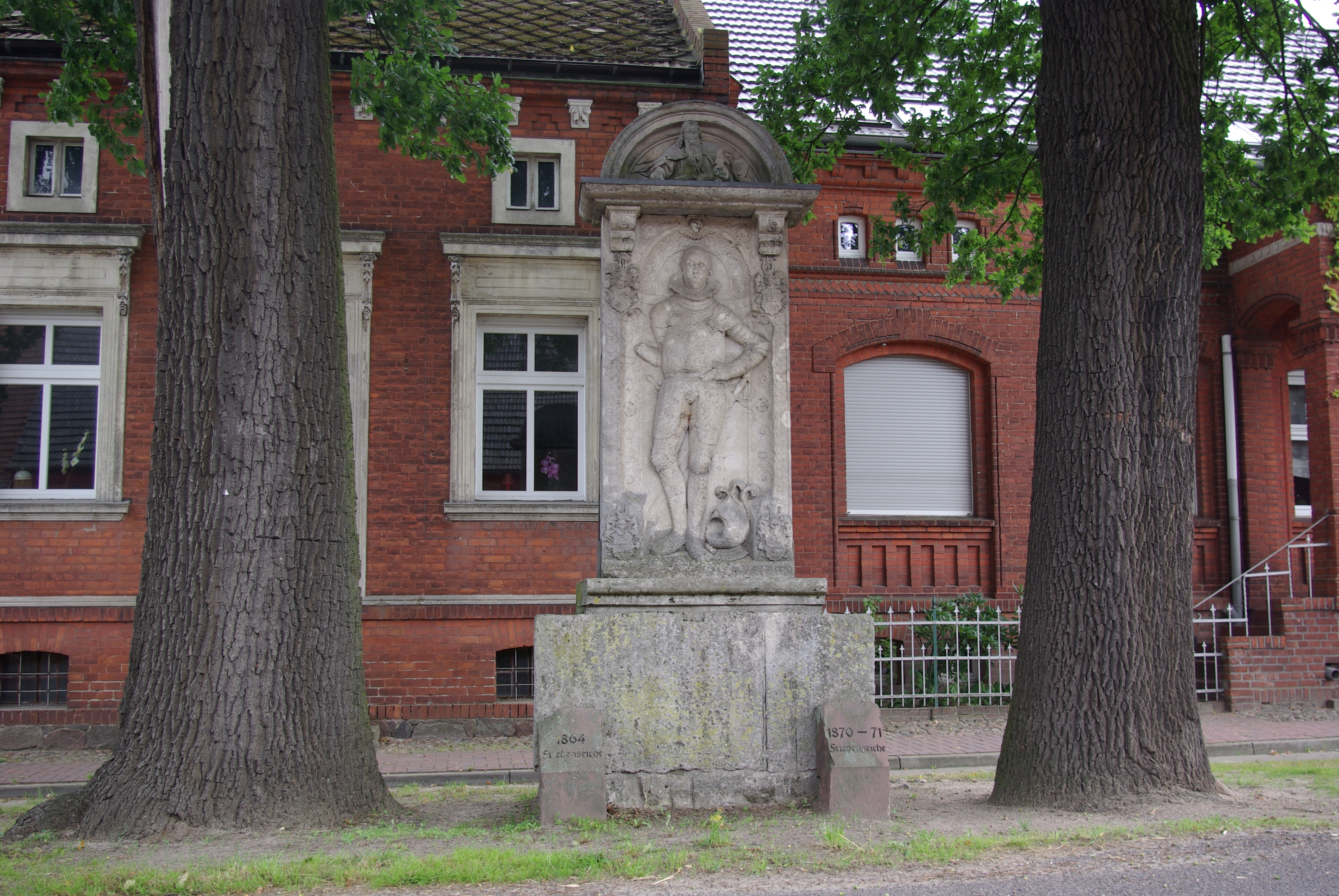 Legde/Quitzöbel in Brandenburg. An der Stelle des Denkmales wurde Dietrich von Quitzow 1593 erschlagen. Der Stein steht unter Denkmalschutz.